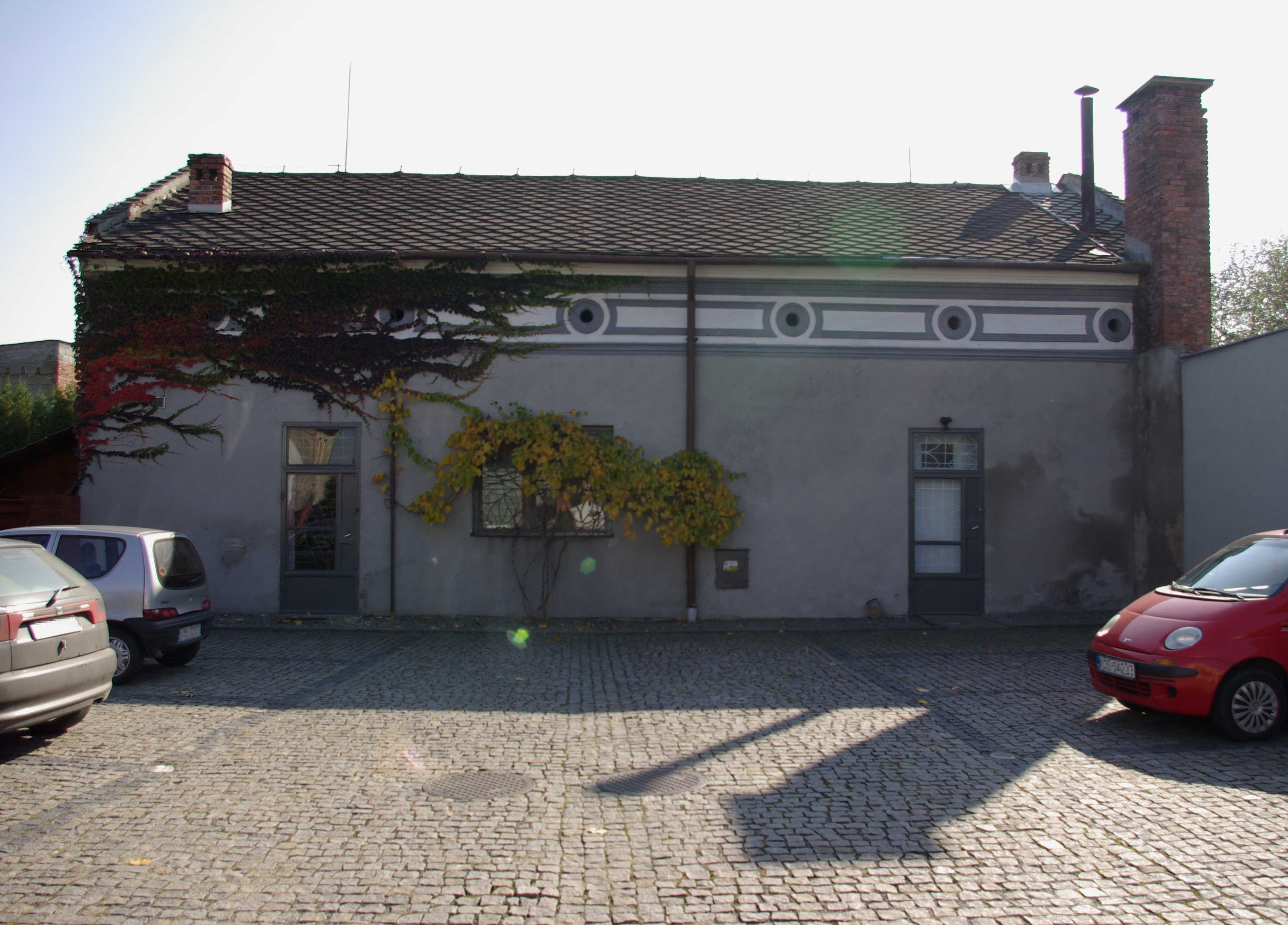 Synagoga Anszei Emes w Kętach